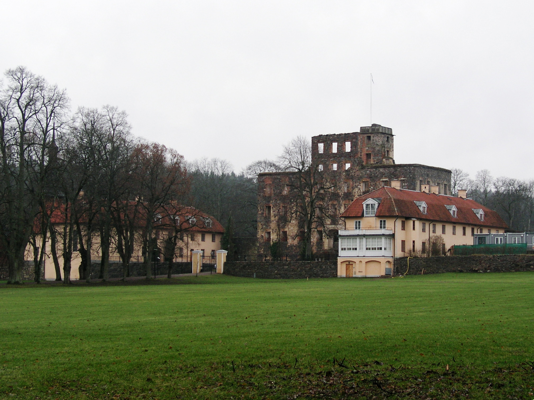 Stjärnorp castle, Linköpings kommun, Sweden